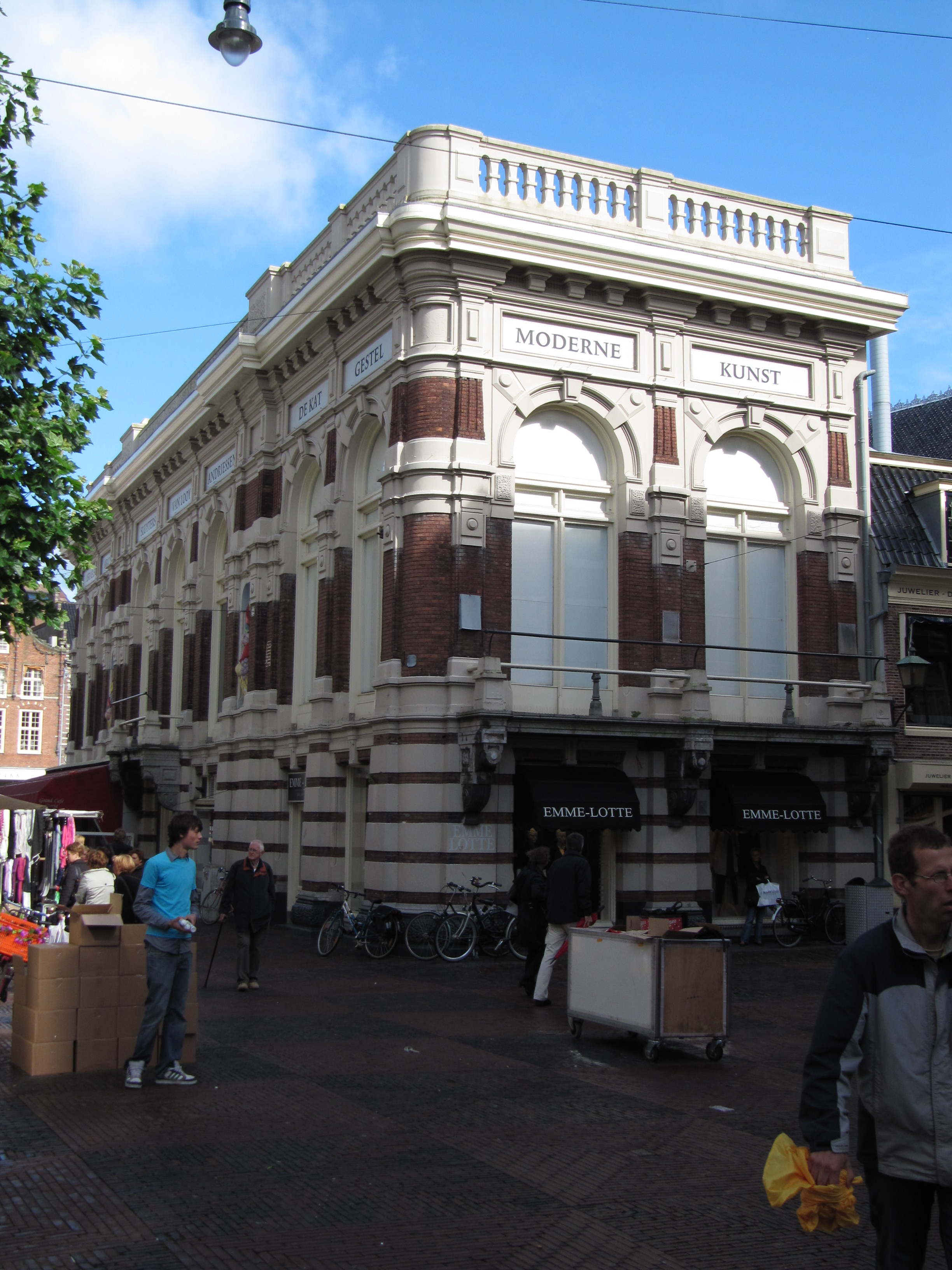 RM513378 Verweyhal te Haarlem - Grote Houtstraat 1.jpg